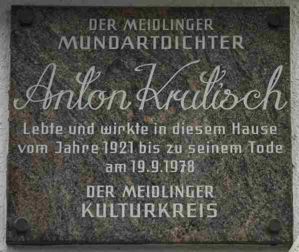 Gedenktafel für Anton Krutisch (Mundartdichter), Niederhofstr. 22